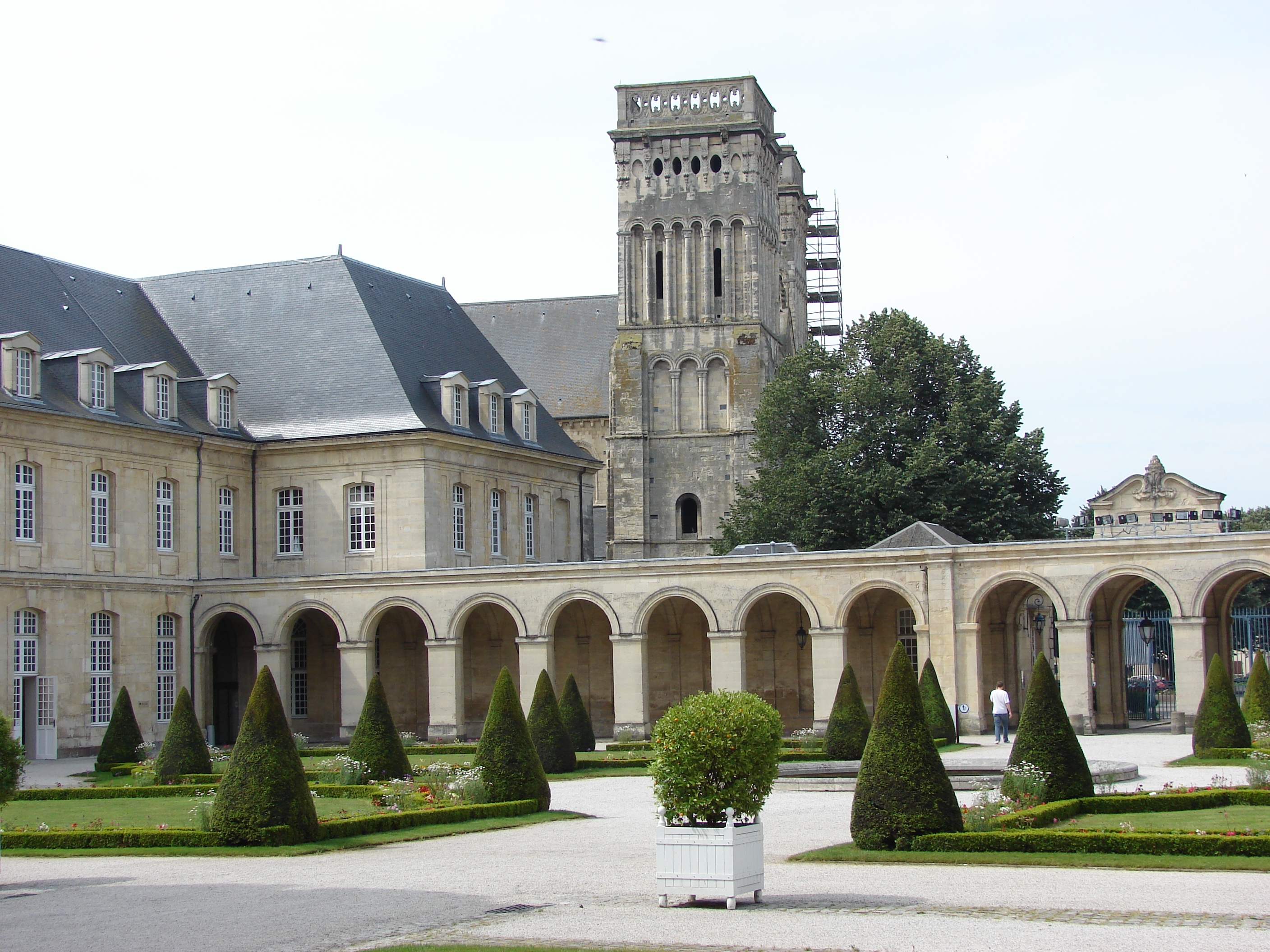 Abbaye aux Dames, église abbatiale de la Sainte-Trinité, Caen, Normandy, France